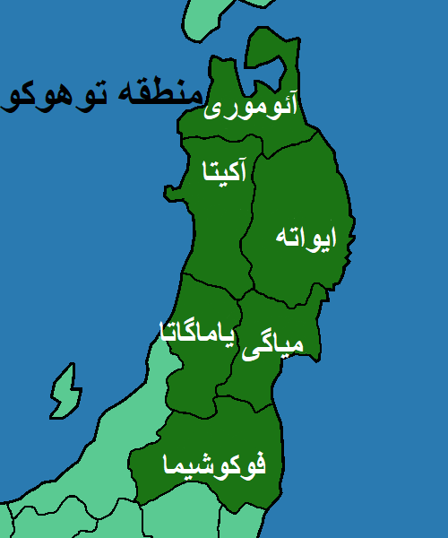 شش استان تشکیل دهنده منطقه توهوکو، آکیتا، آئوموری، فوکوشیما، ایواته، میاگی و یاماگاتا